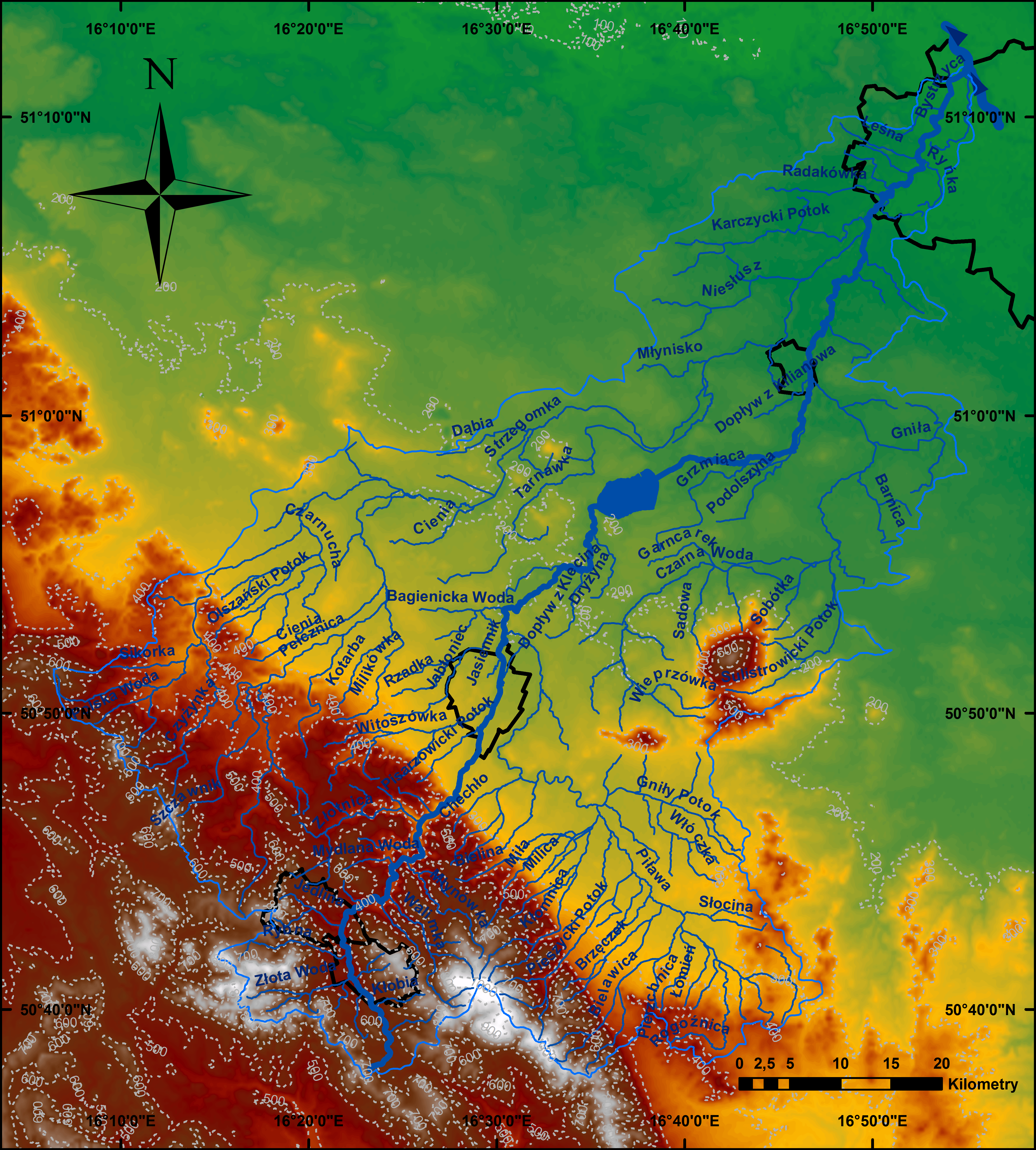 Dorzecze Bystrzycy; rzeka Bystrzyca = pogrubiona niebieska linia, jej dopływy = cienkie niebieskie linie, Odra – fragment (recypient) = bardzo gruba niebieska linia z grotem wskazującym kierunek prądu, granica zlewni Bystrzycy = jasnoniebieska linia, miasta (w granicach administracyjnych) przez które przepływa Bystrzyca (od źródła: Głuszyca, Jedlina-Zdrój, Świdnica, Kąty Wrocławskie, Wrocław) = czarne obrysy, izohipsy = szare obrysy przerywane